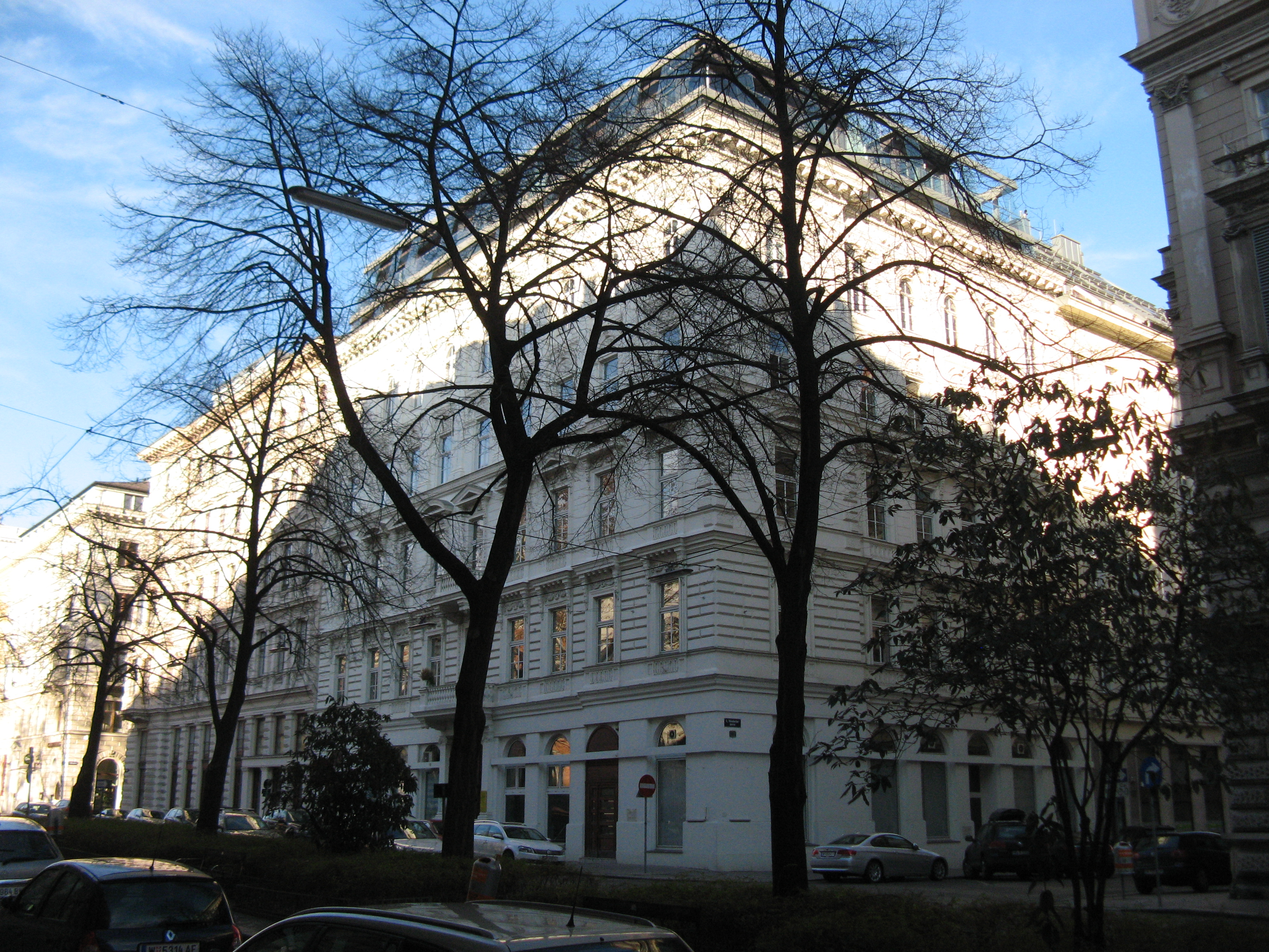 Haus Börsegasse Nr. 10 (1872-73) von Julius Dörfel, Wien-Innere Stadt